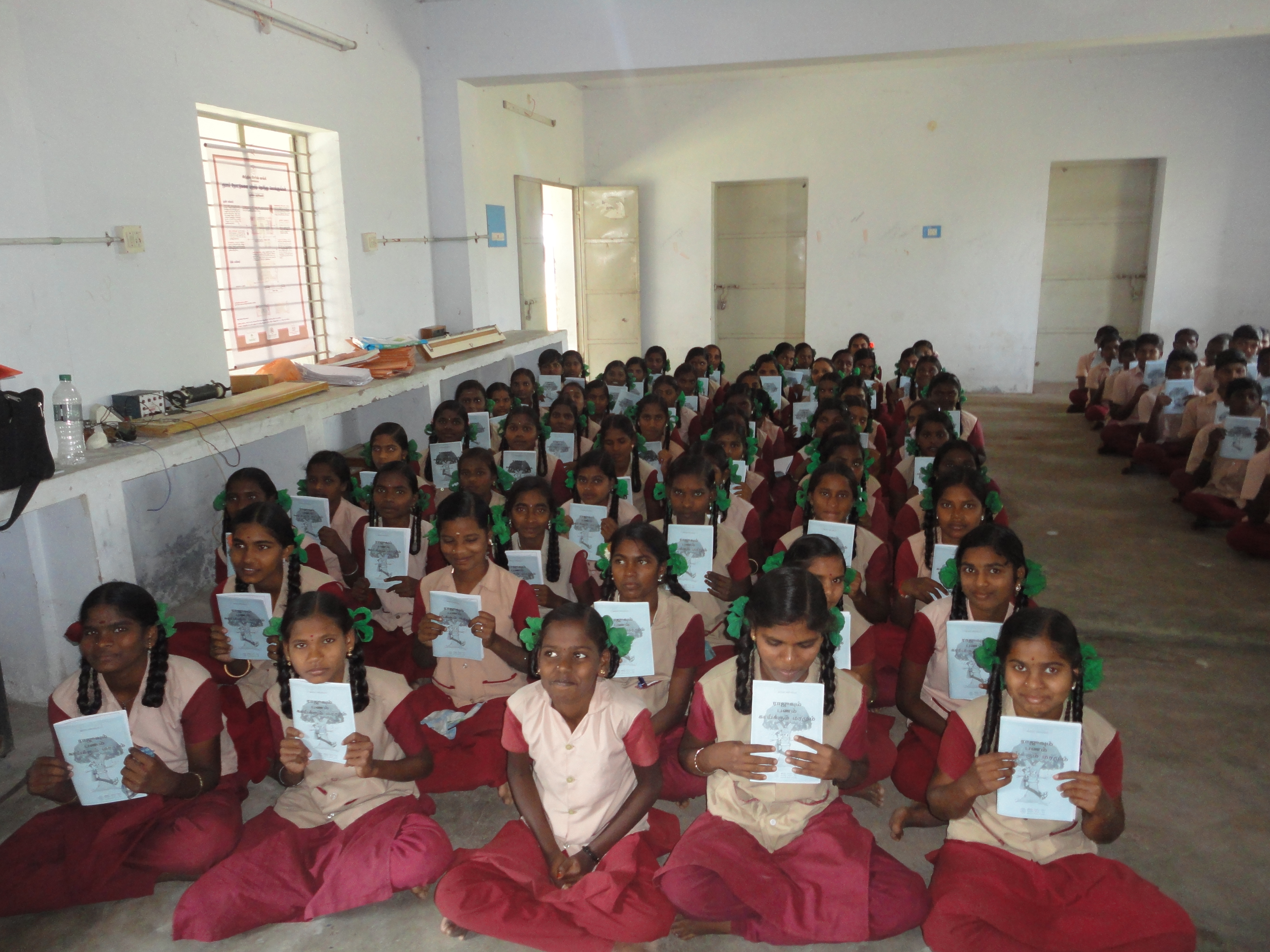 பள்ளியில் மாணவிகள் கல்வி கற்றல்